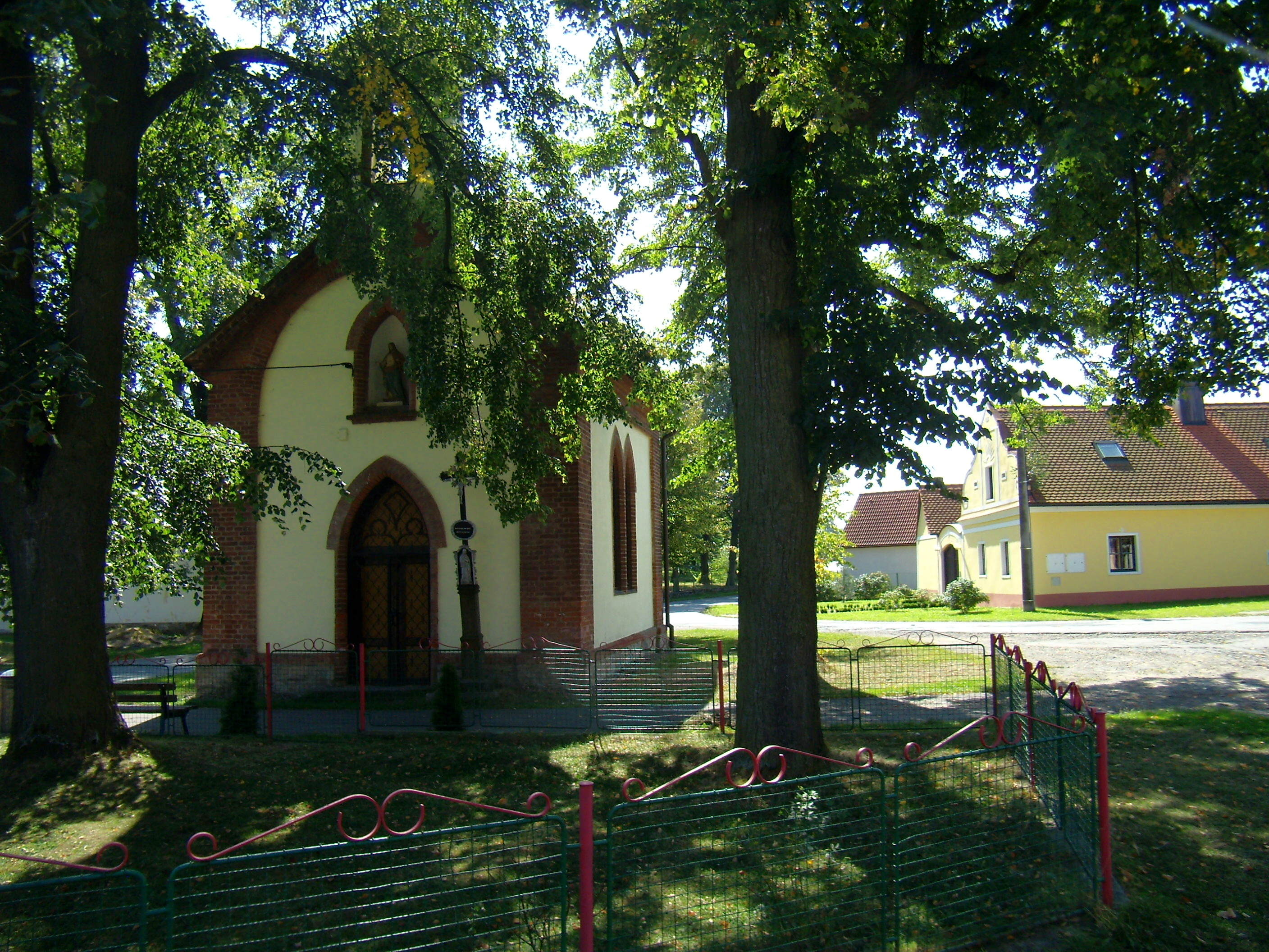 Žitná - kaplička